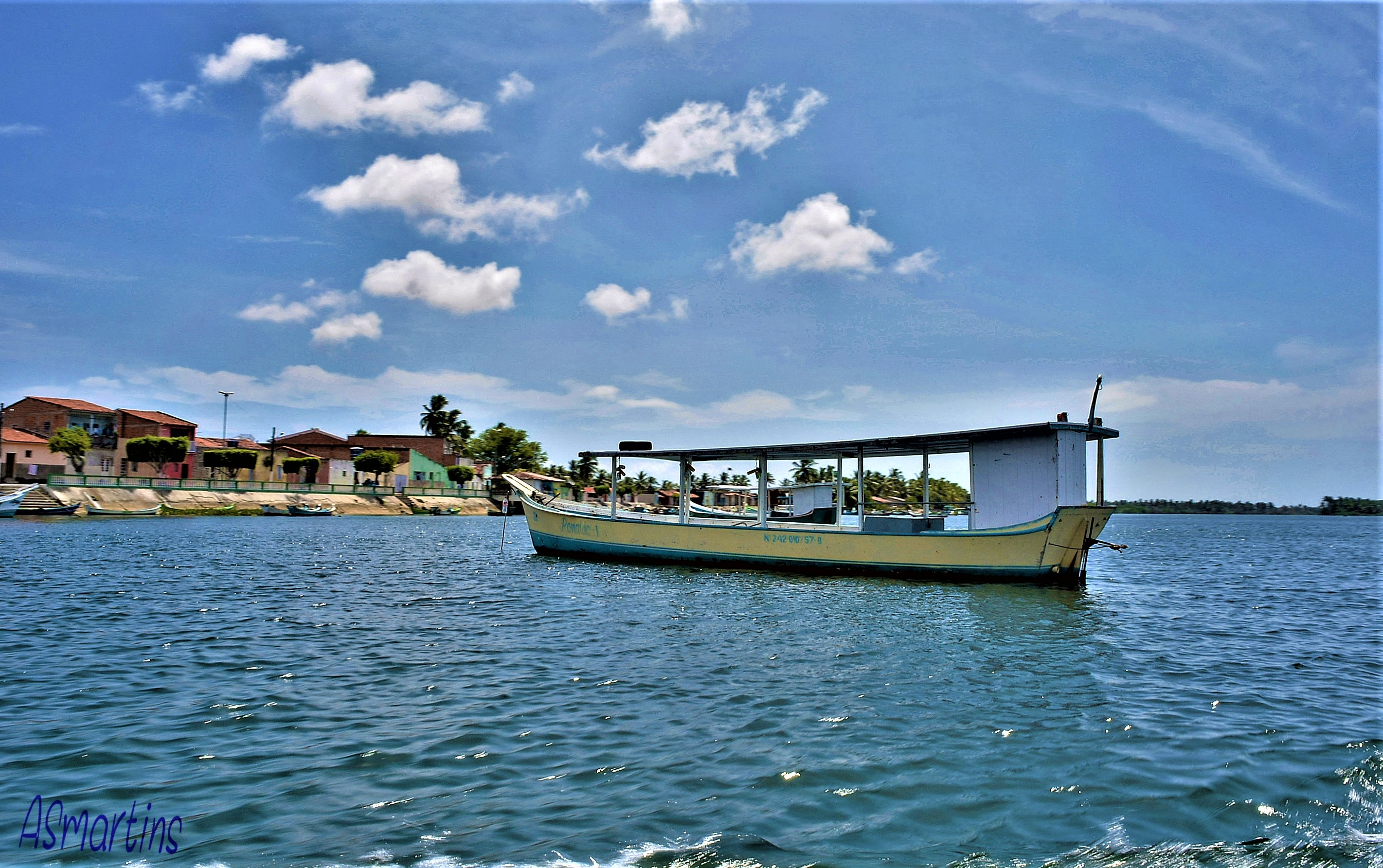 Rio de S. Francisco, também conhecido carinhosamente por Tio Chico, em Piaçabuçu